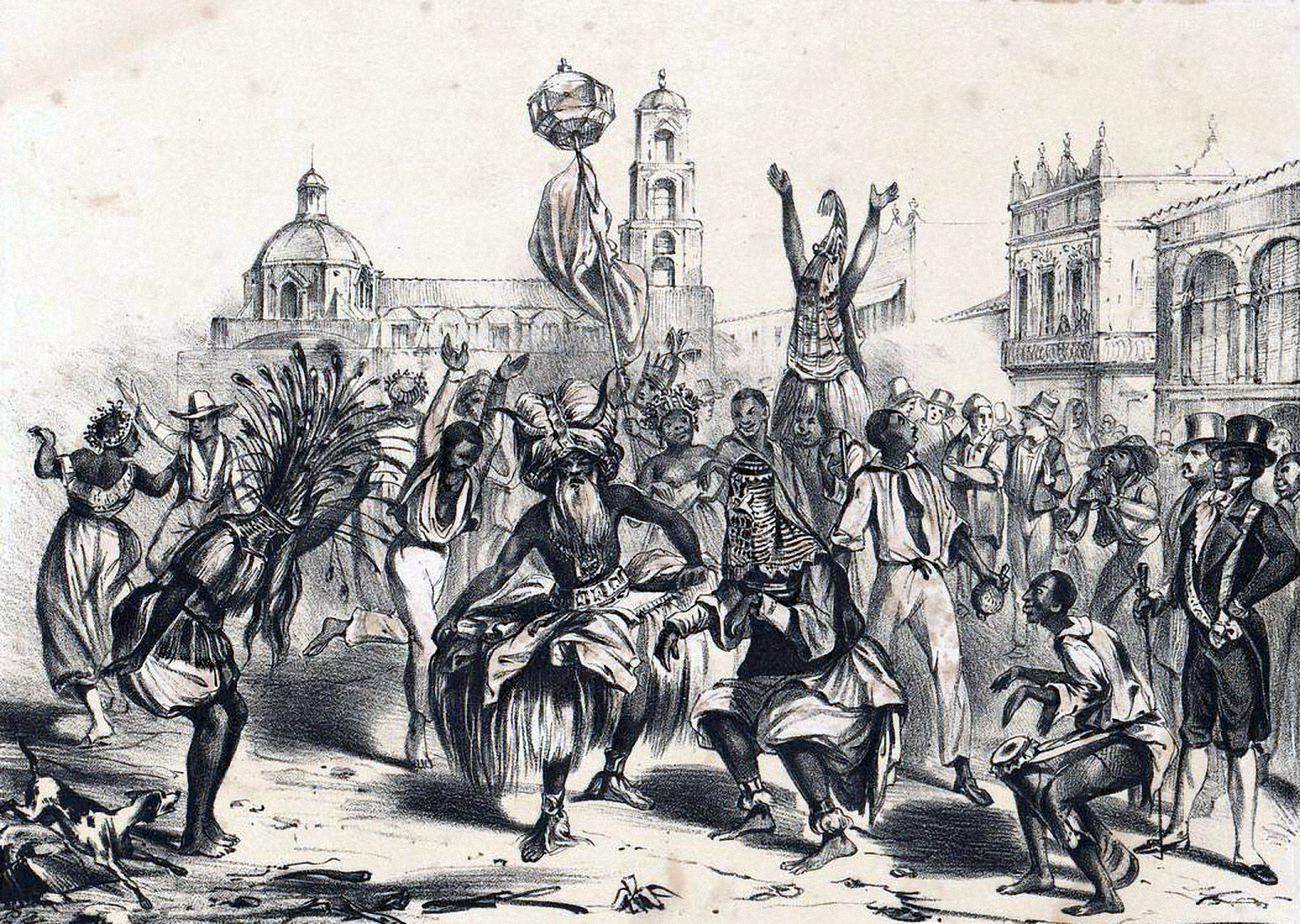 Día de Reyes